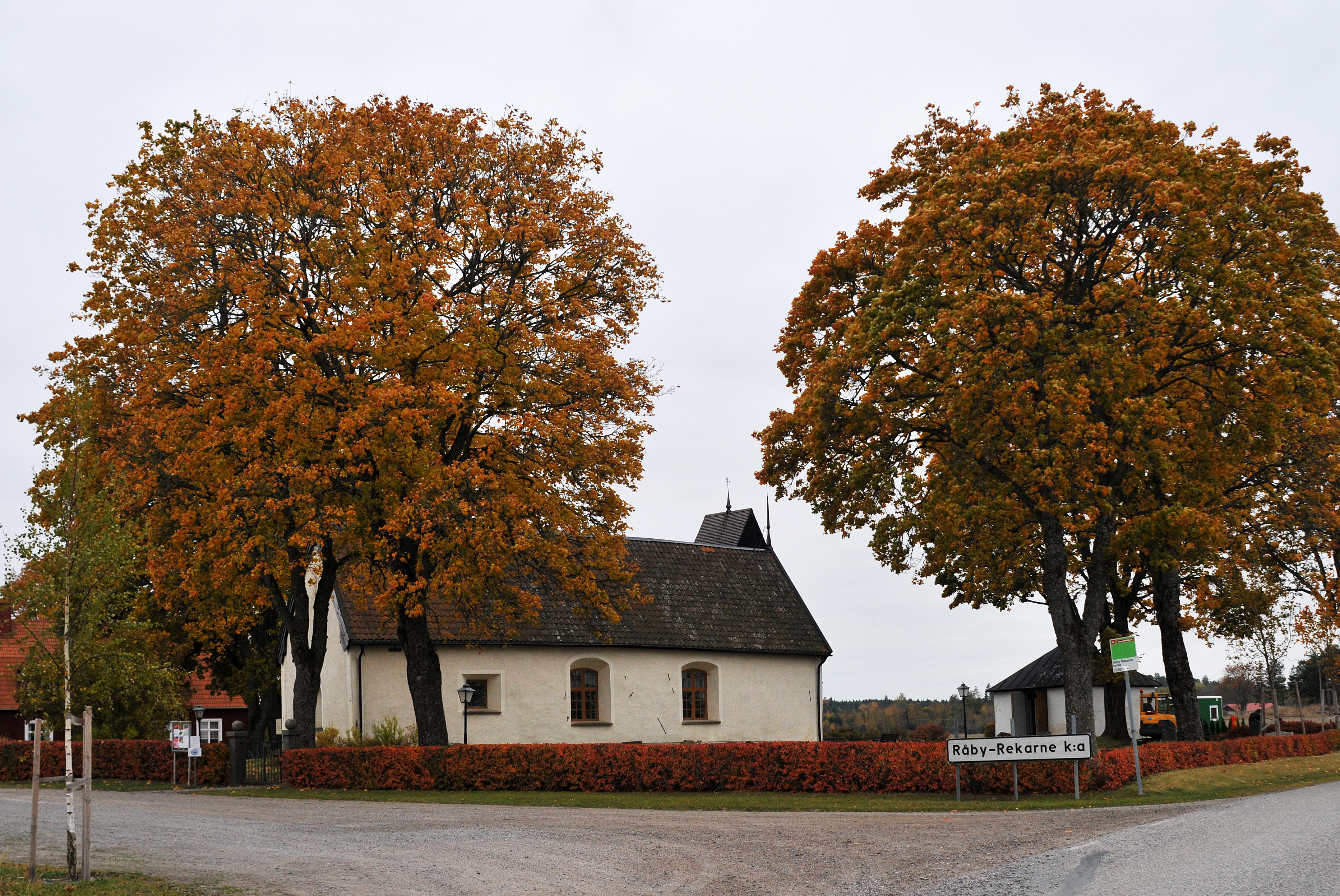 Råby-Rekarne kyrka är en kyrkobyggnad i Hällby församling i Eskilstuna kommun. Kyrkan uppfördes på 1100-talet och är en av Sörmlands äldsta och minsta kyrkor.